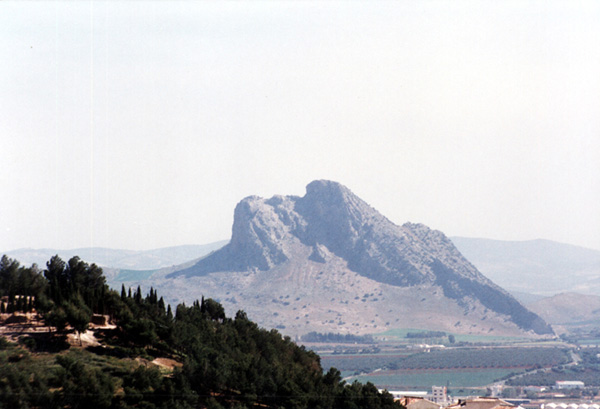 La Peña de los Enamorados, nabij Antequera Afbeelding gemaakt door Herman Kappen